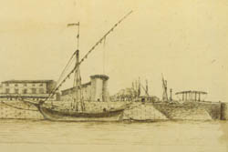 Langlois bridge on its original location, at écluse de la Roquette (Arles).